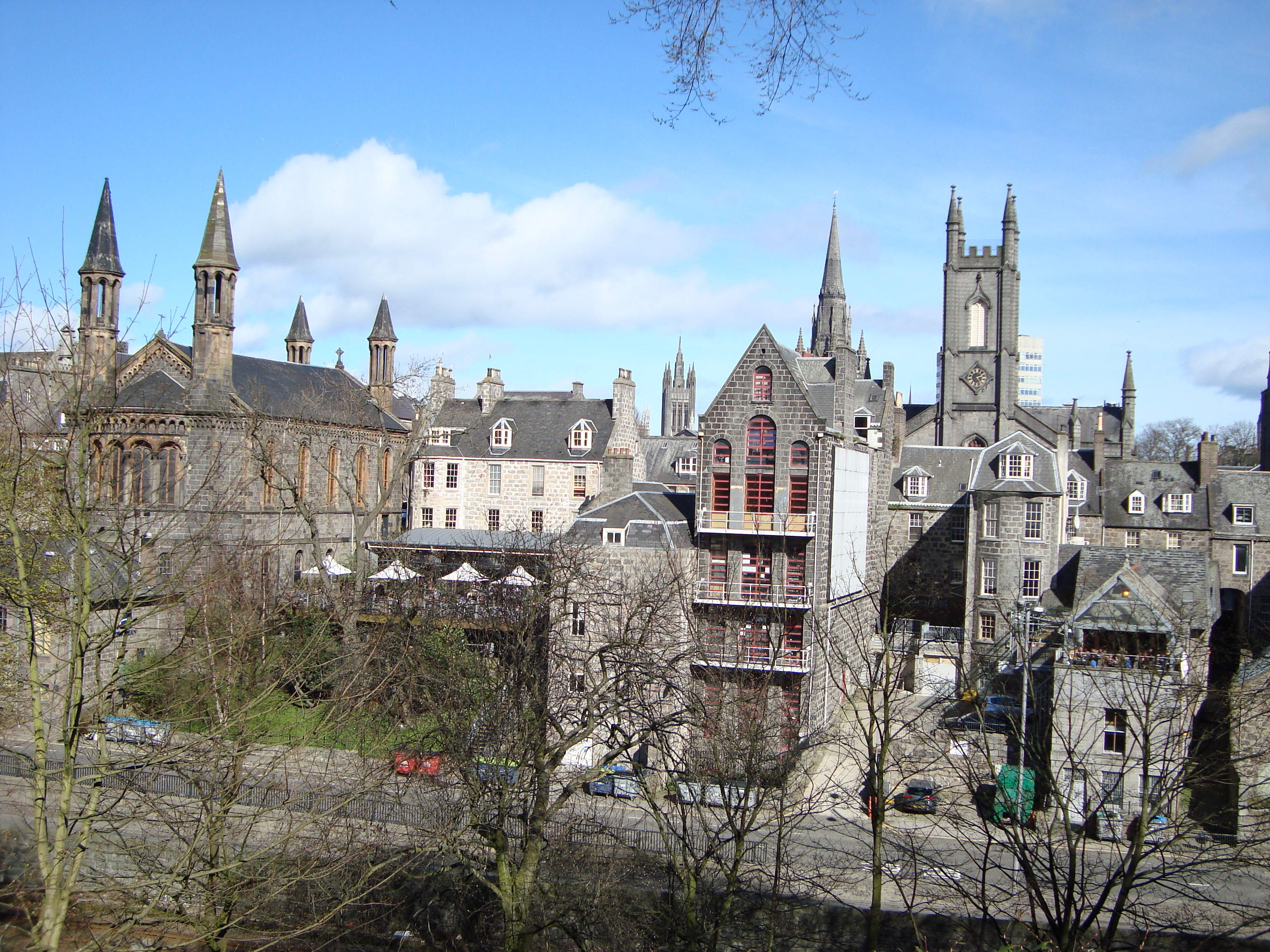 Aberdeen